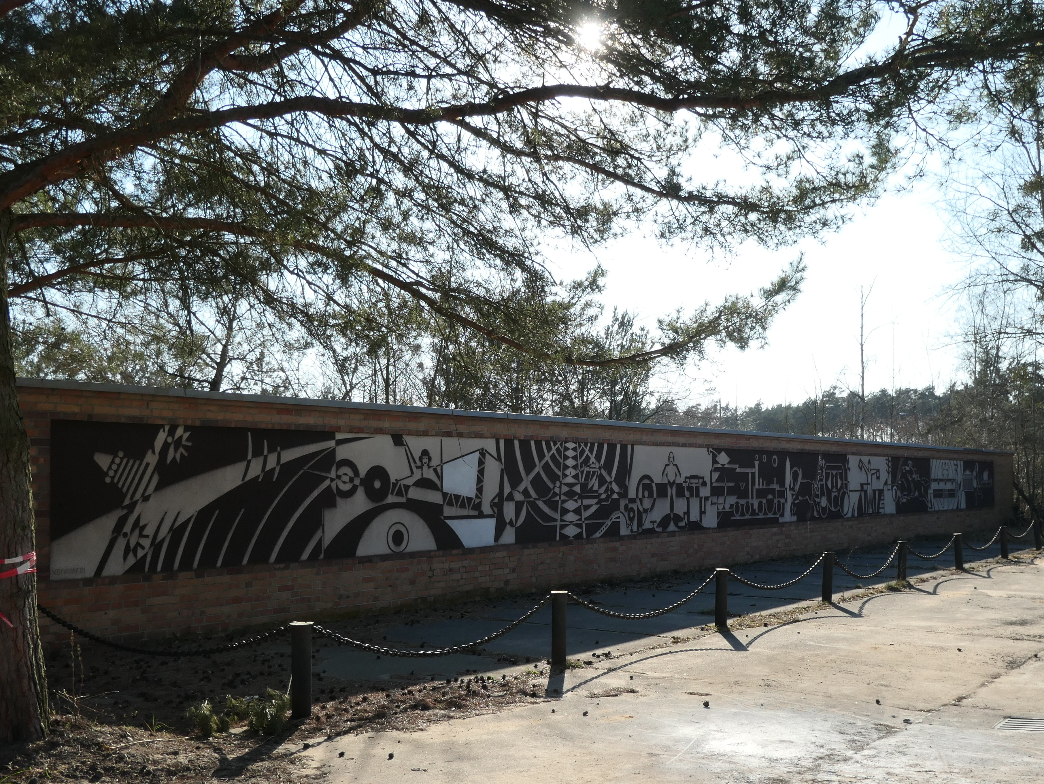 Ludwigsfelde "Geschichte der Nachrichtentechnik" von Volkhard Böhme an der Mauer einer früheren Kaserne, denkmalgeschützt. Totale.